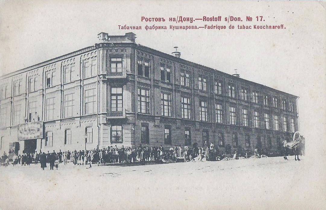 Старый Ростов-на-Дону. Здание табачной фабрики Кушнарева